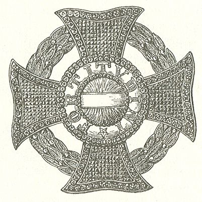 Scan van Blz. 268 van het boek "Handbuch der Ritter- und Verdienstorden " uitgegeven 1893 door Weber.Tekening van de in 1902 overleden Maximilian Gritzner. Robert Prummel 10 jul 2008 16:40 (CEST)